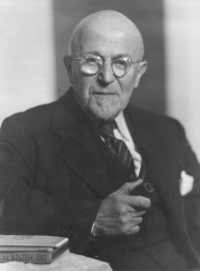 Porträt von Richard Lenel (schwarz/weiss), aus dem Familienarchiv von Peet Lenel.